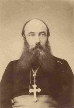 Ferdinand Hamer (Nijmegen, 21 augustus 1840 - To Tsjeng (Mongolië), 25 juli 1900) was een Nederlandse missionaris die in Mongolië tot bisschop werd gewijd en omkwam tijdens de Bokseropstand.